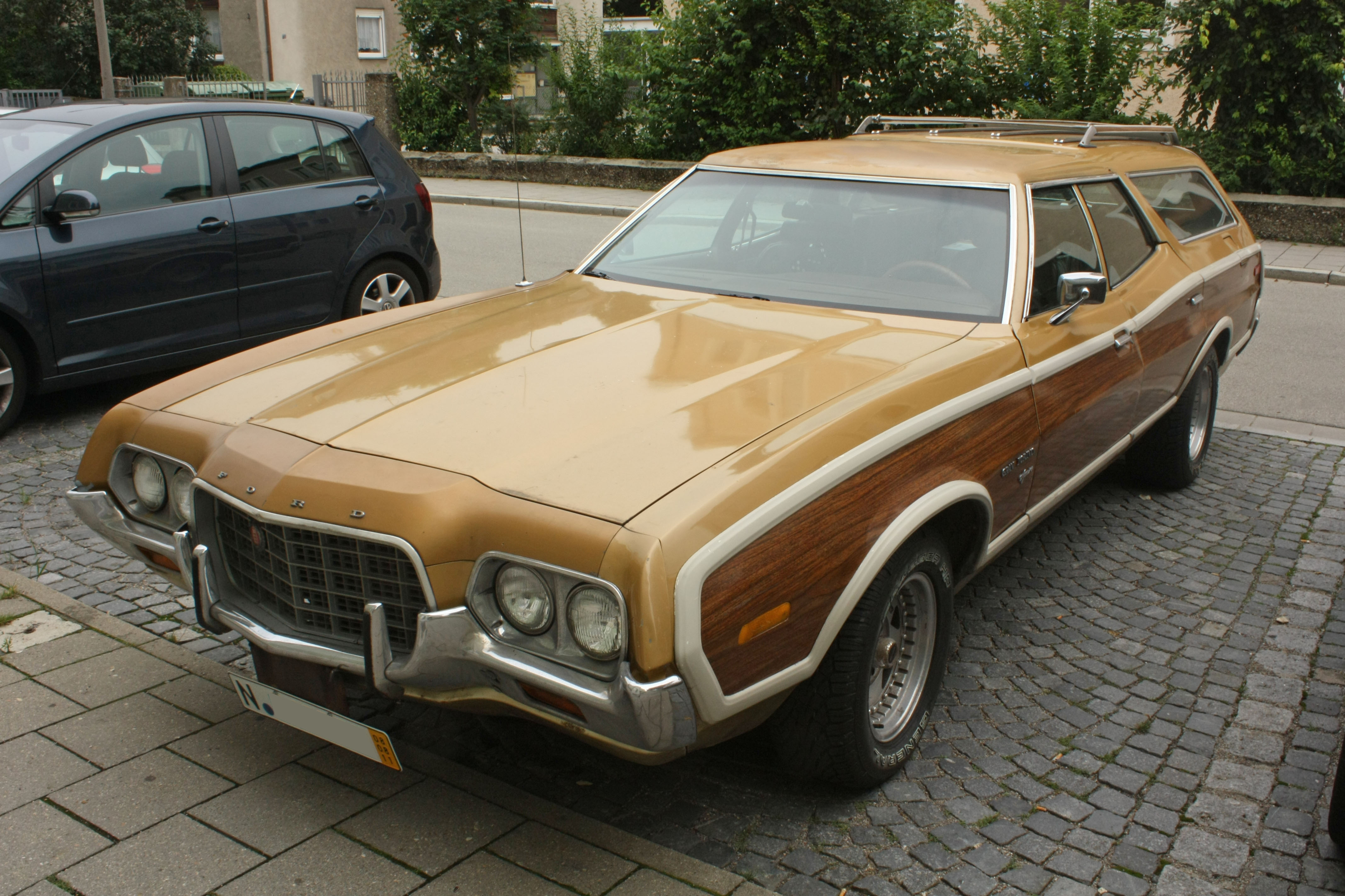 Ford Gran Torino Squire (Bj. 1972)